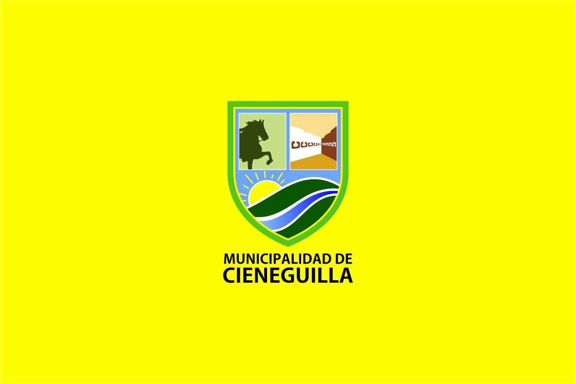 Distrito de Cieneguilla - Provincia de Lima - región Lima